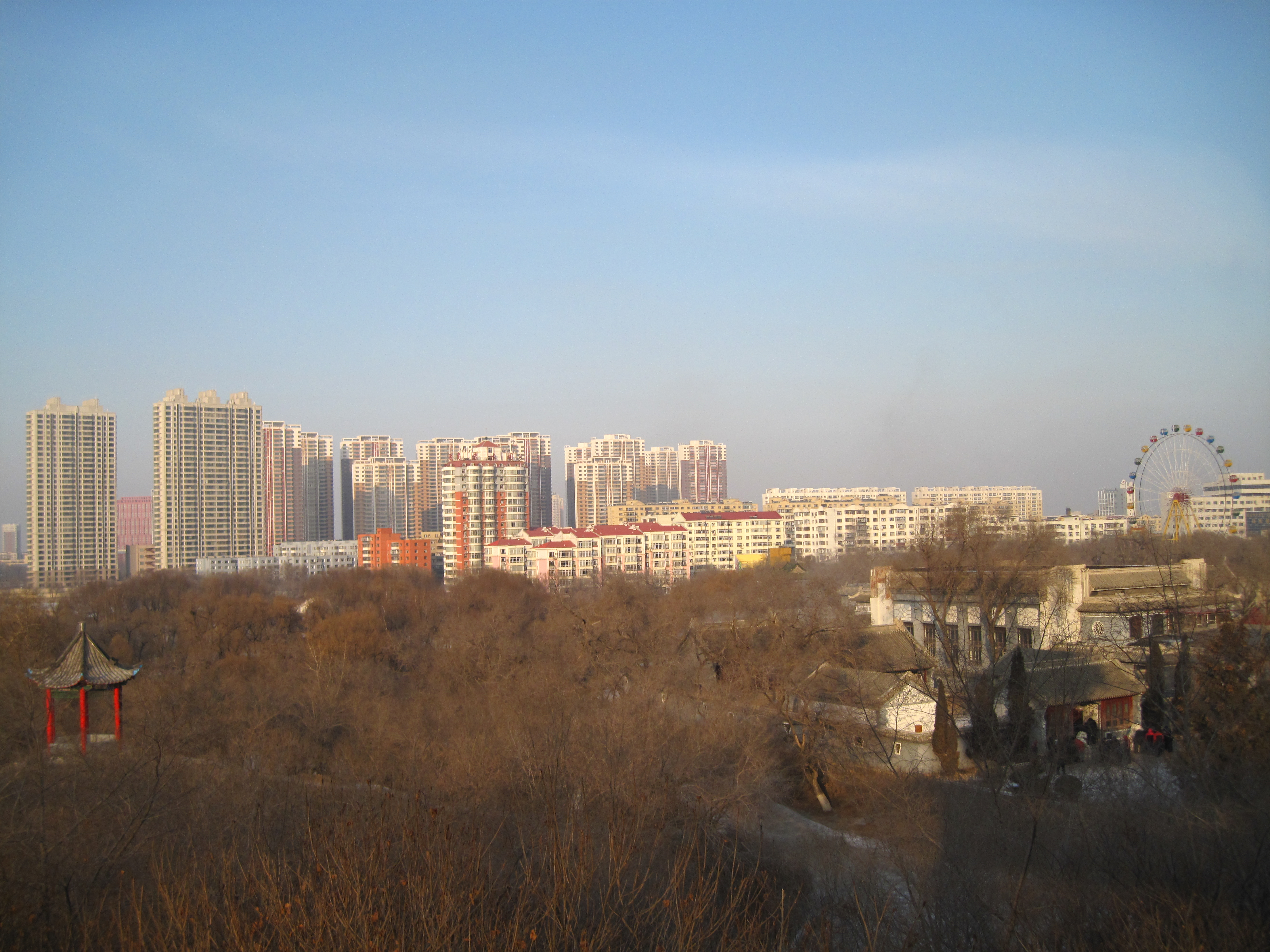 齐齐哈尔天际线，摄于龙沙公园。